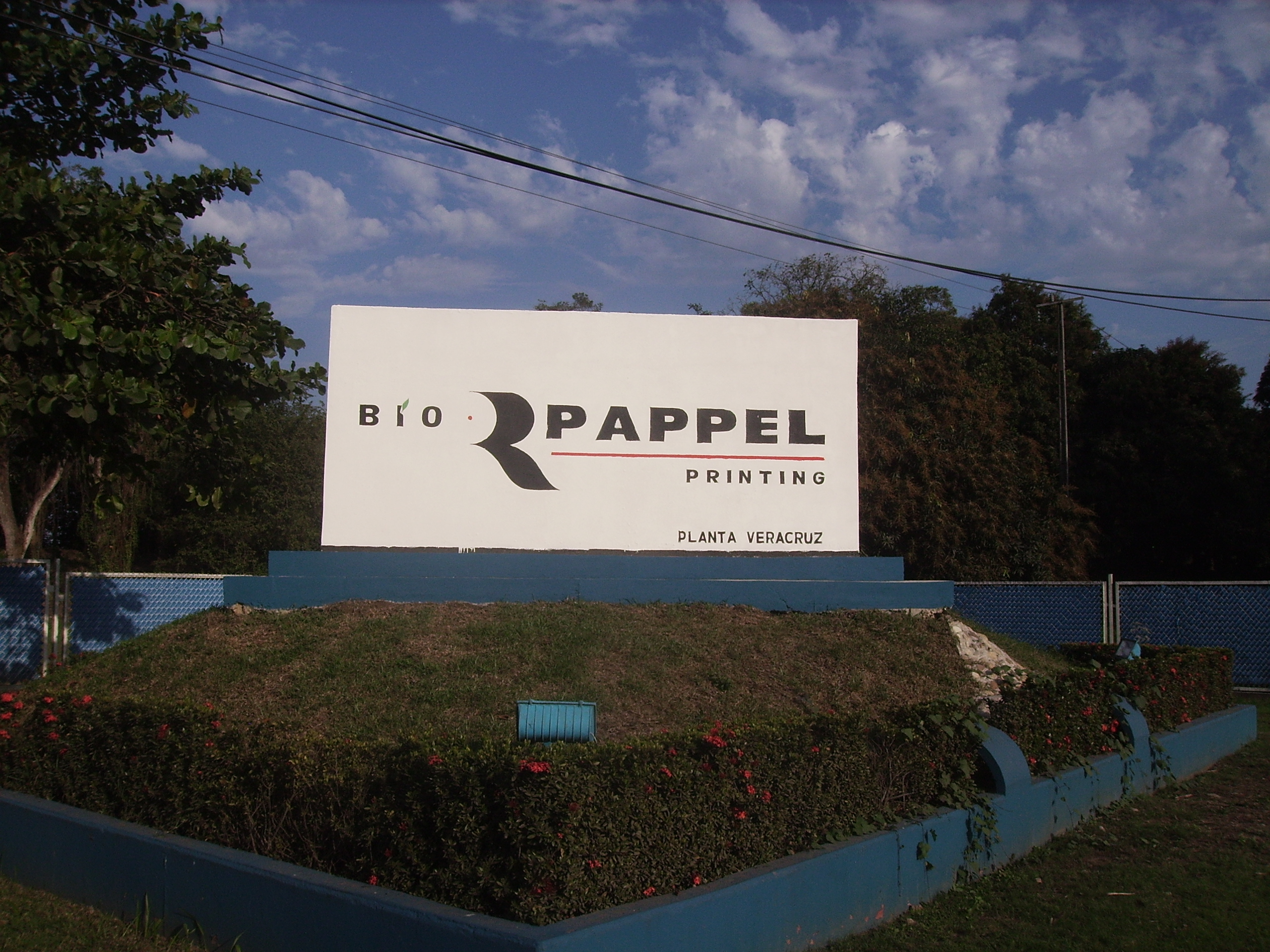 Fabrica de papel en Tres Valles, Ver., imagen de la bienvenida en la entrada.